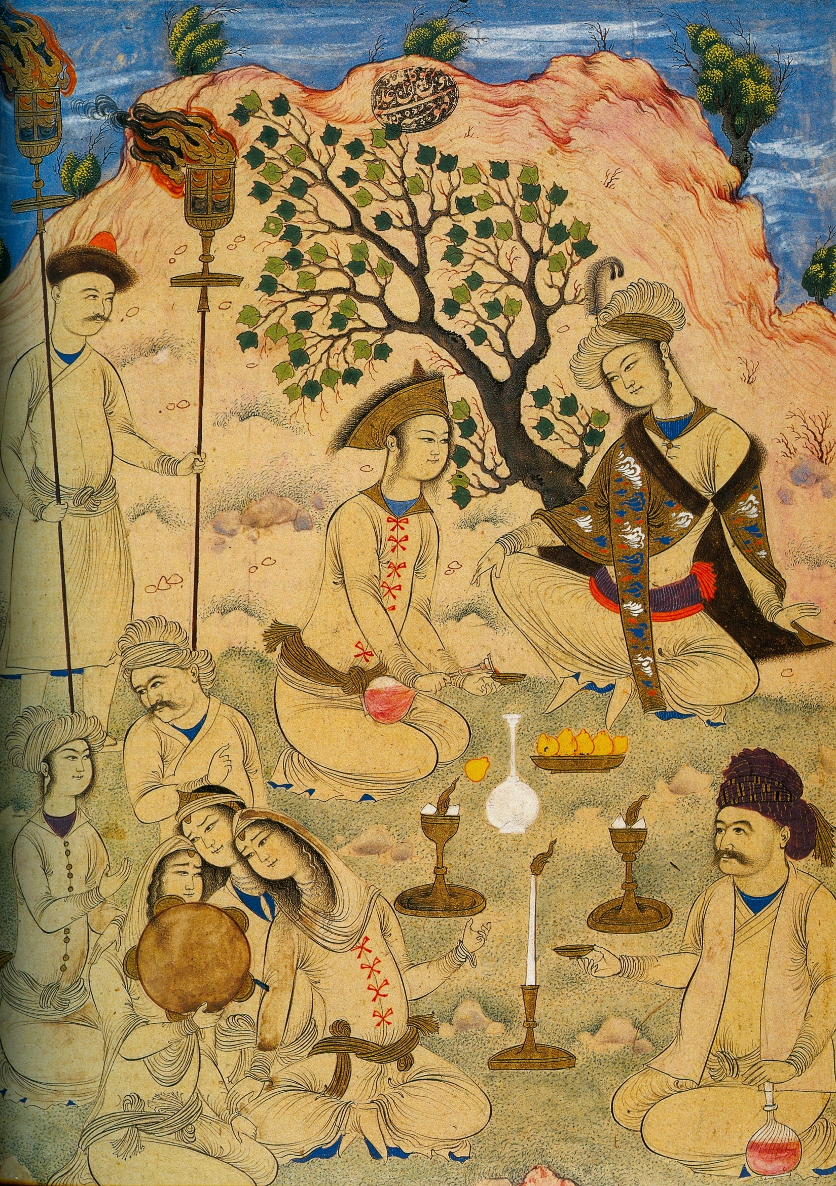 Ночной пикник. 1620-25 Брит.муз